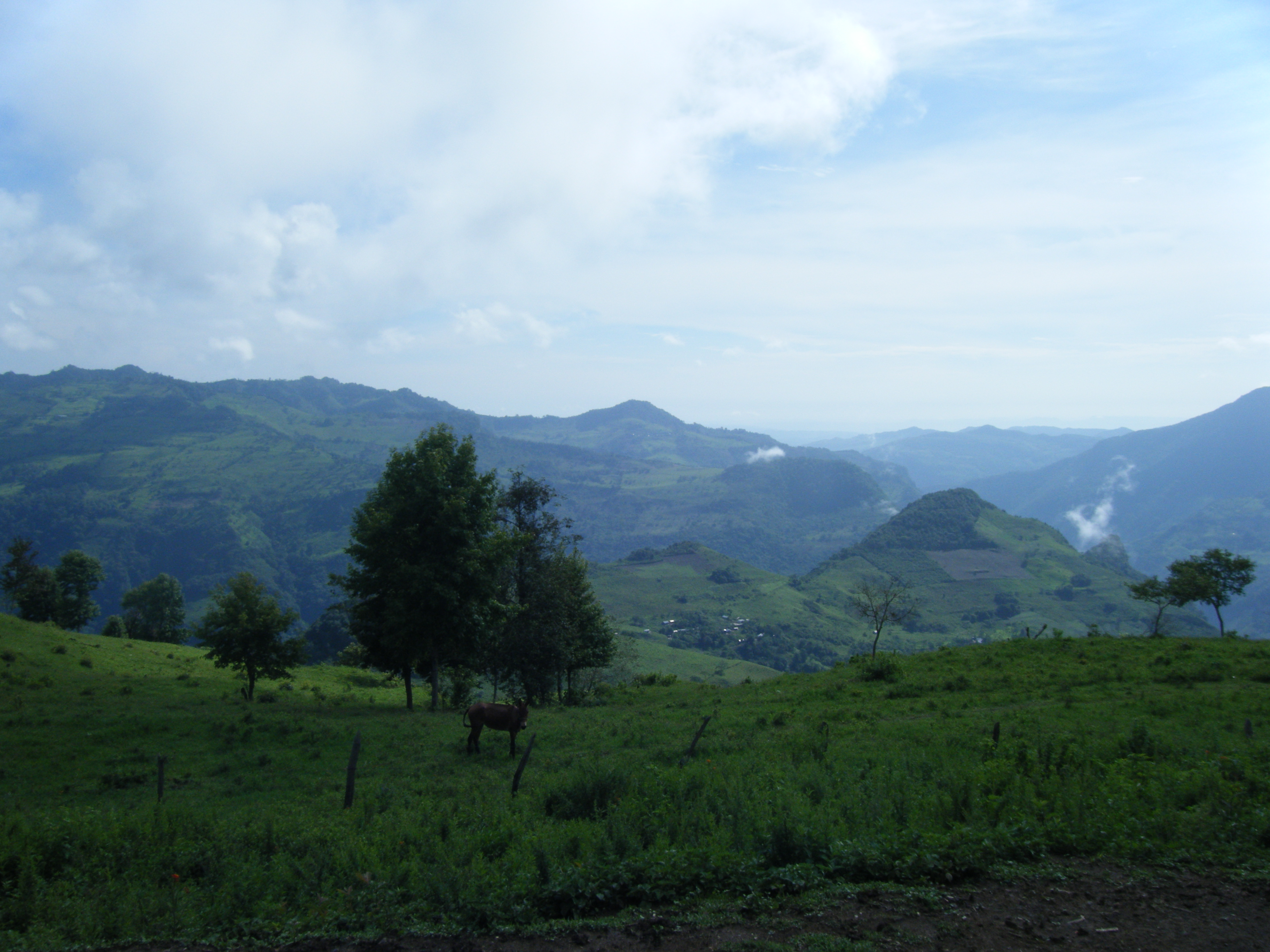 Calor nenjo